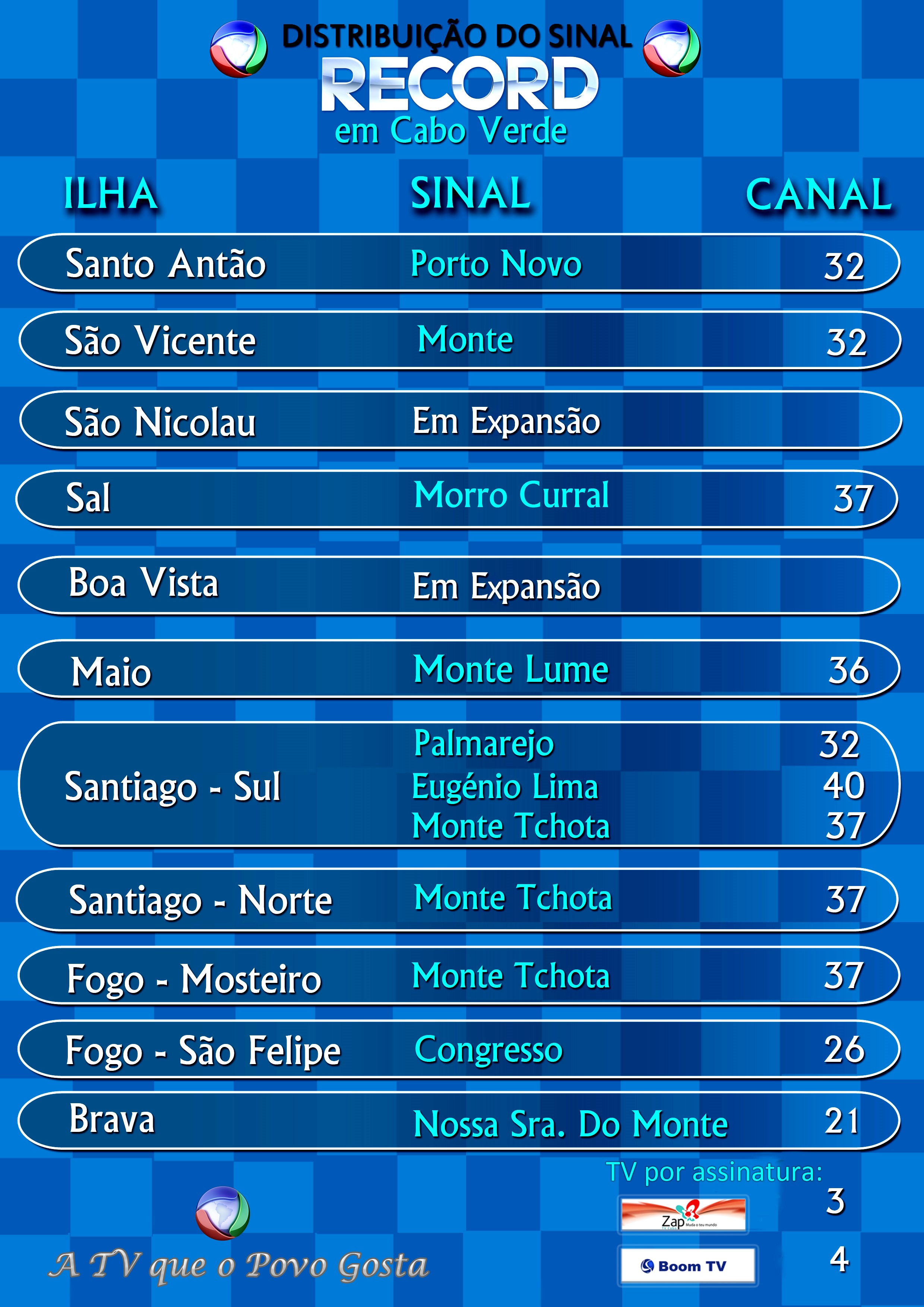 Canais da Record Cabo Verde por Ilhas.